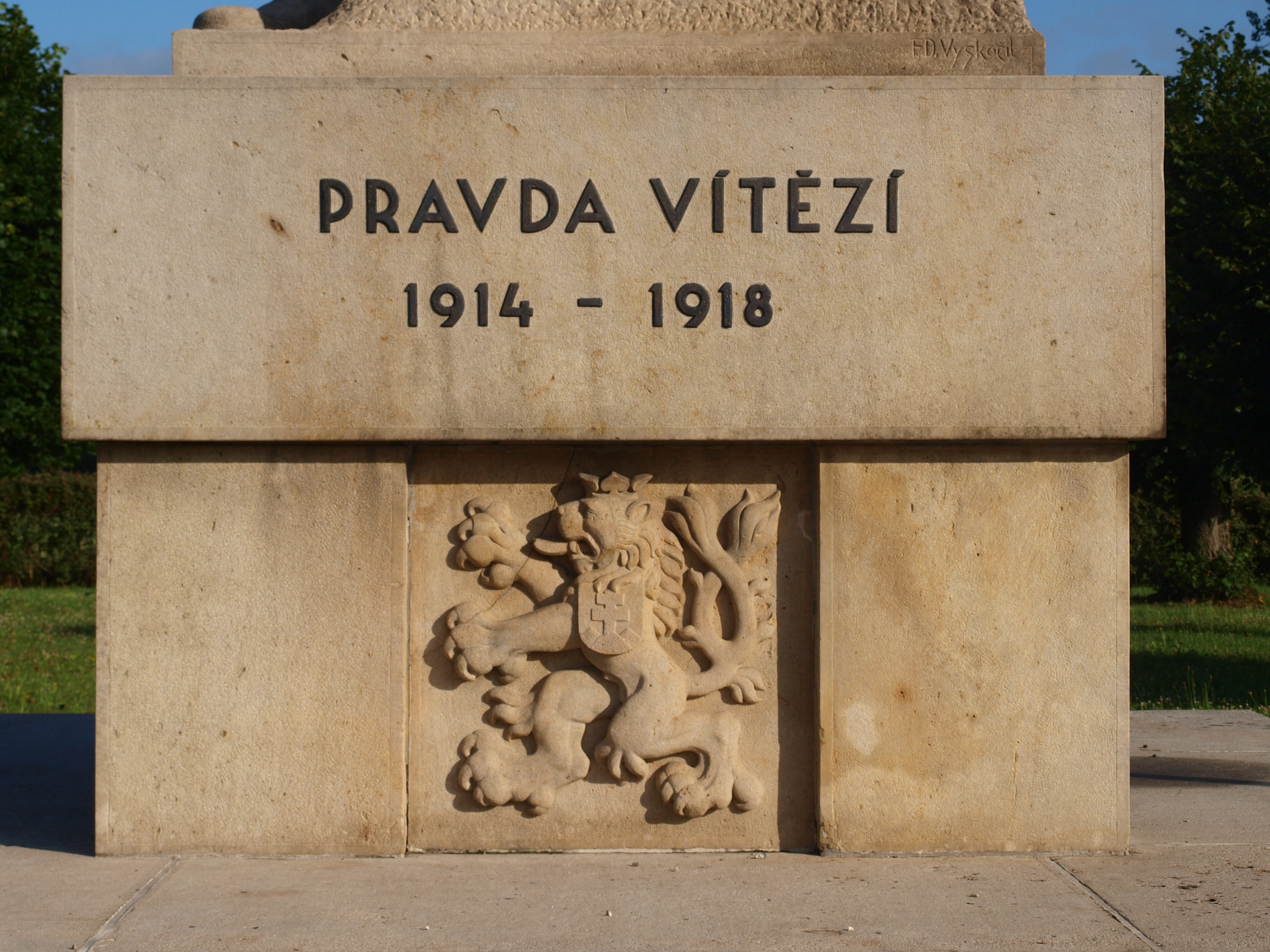 Chestres (Vouziers, Ardennes, France) ; le mémorial tchécoslovaque aux combattants de 1918, au lieu-dit Bobot.